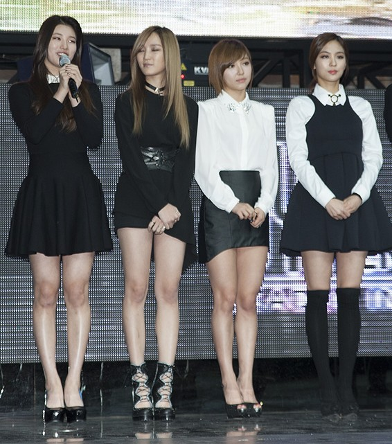 스마일게이트-JYP엔터테인먼트 MOU 체결식